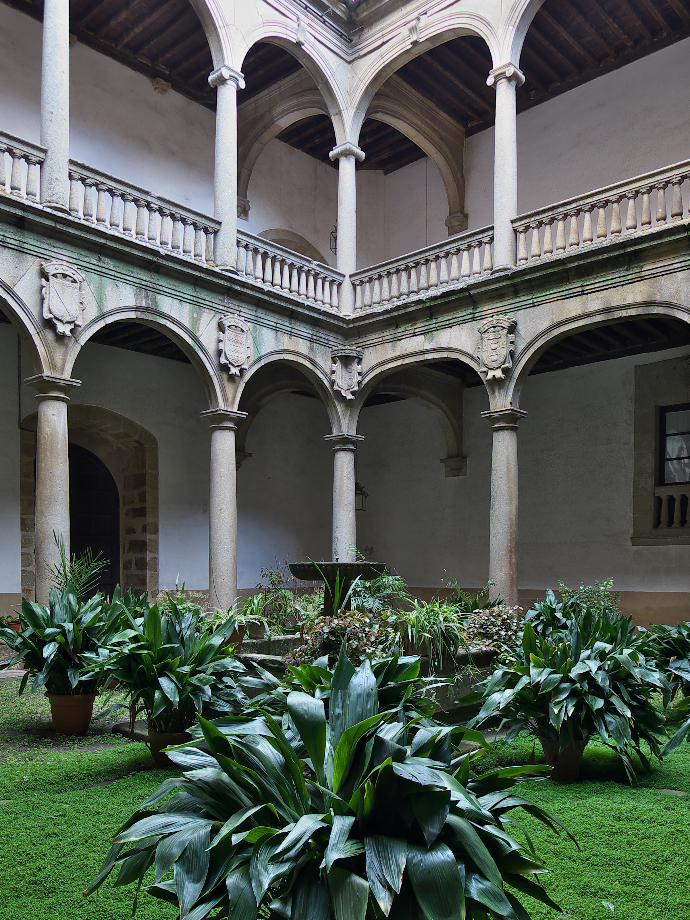 Detalle del patio, promovido por Fadrique de Zúñiga y Sotomayor y Luis de Ávila y Zúñiga (ca. 1535).